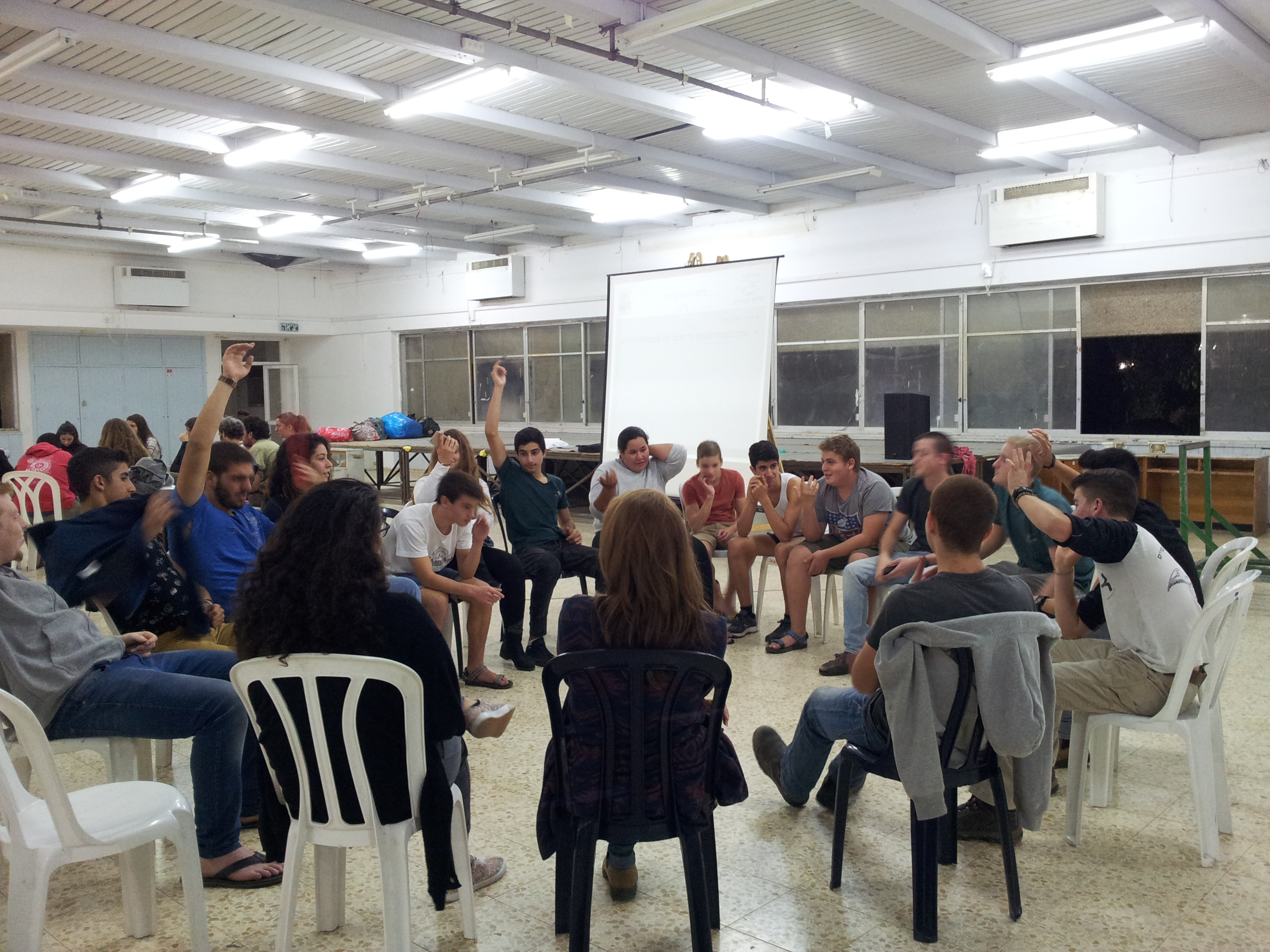 הצבעה במהלך מועצת חכמים